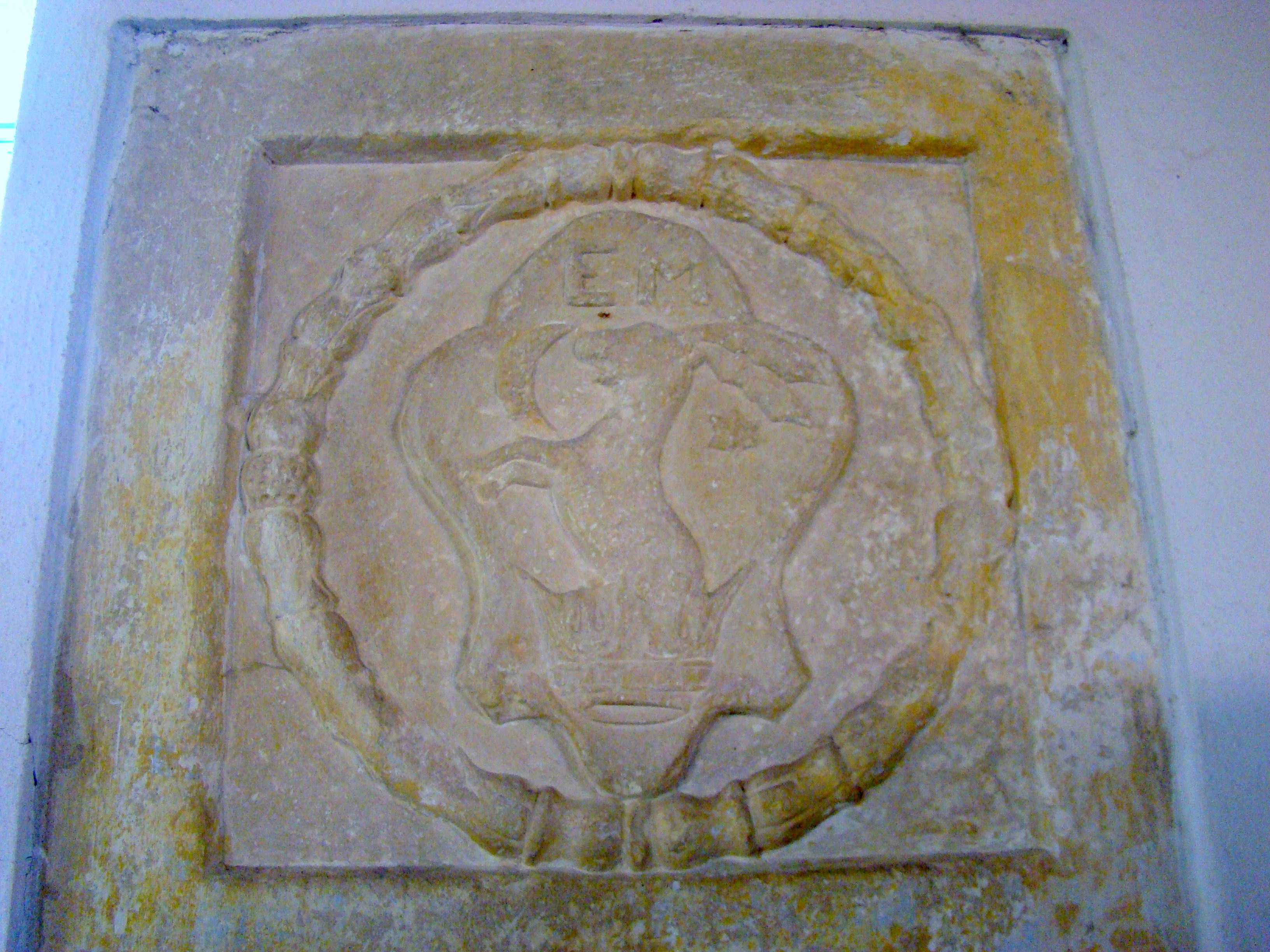 Biserica reformată, sat DUMBRAVA; comuna CĂPUŞU MARE, județul Cluj